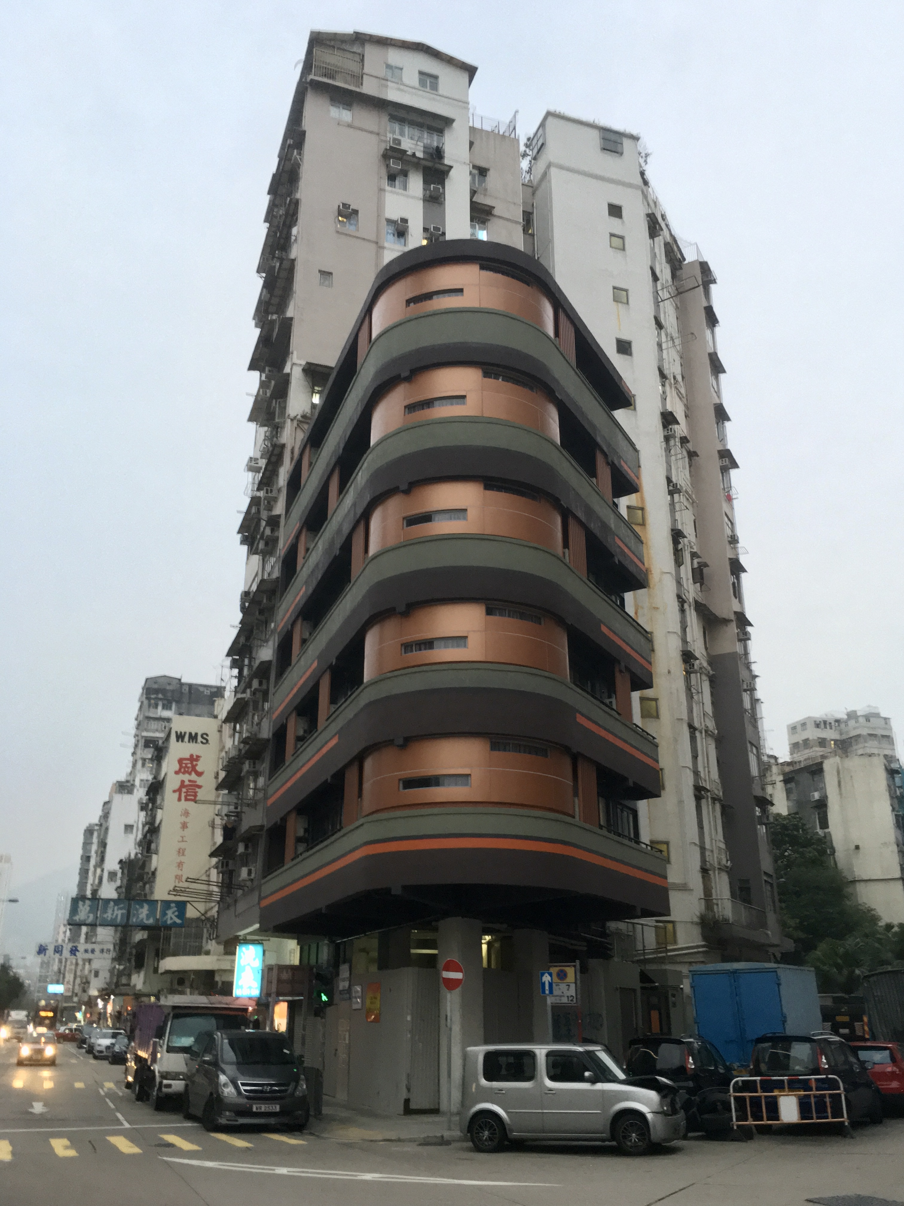 翻新後的為群公寓